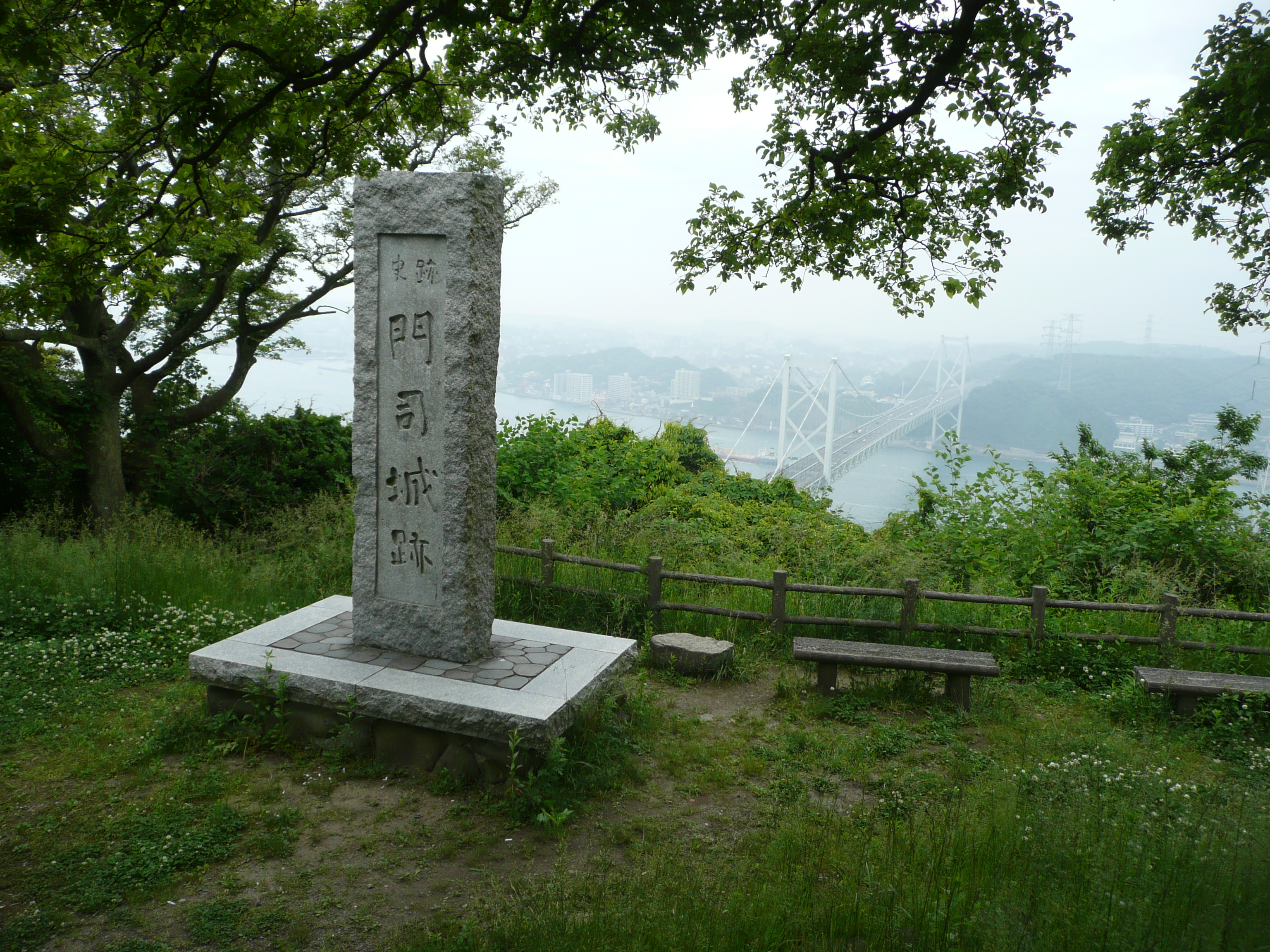 門司城の石碑と関門海峡大橋